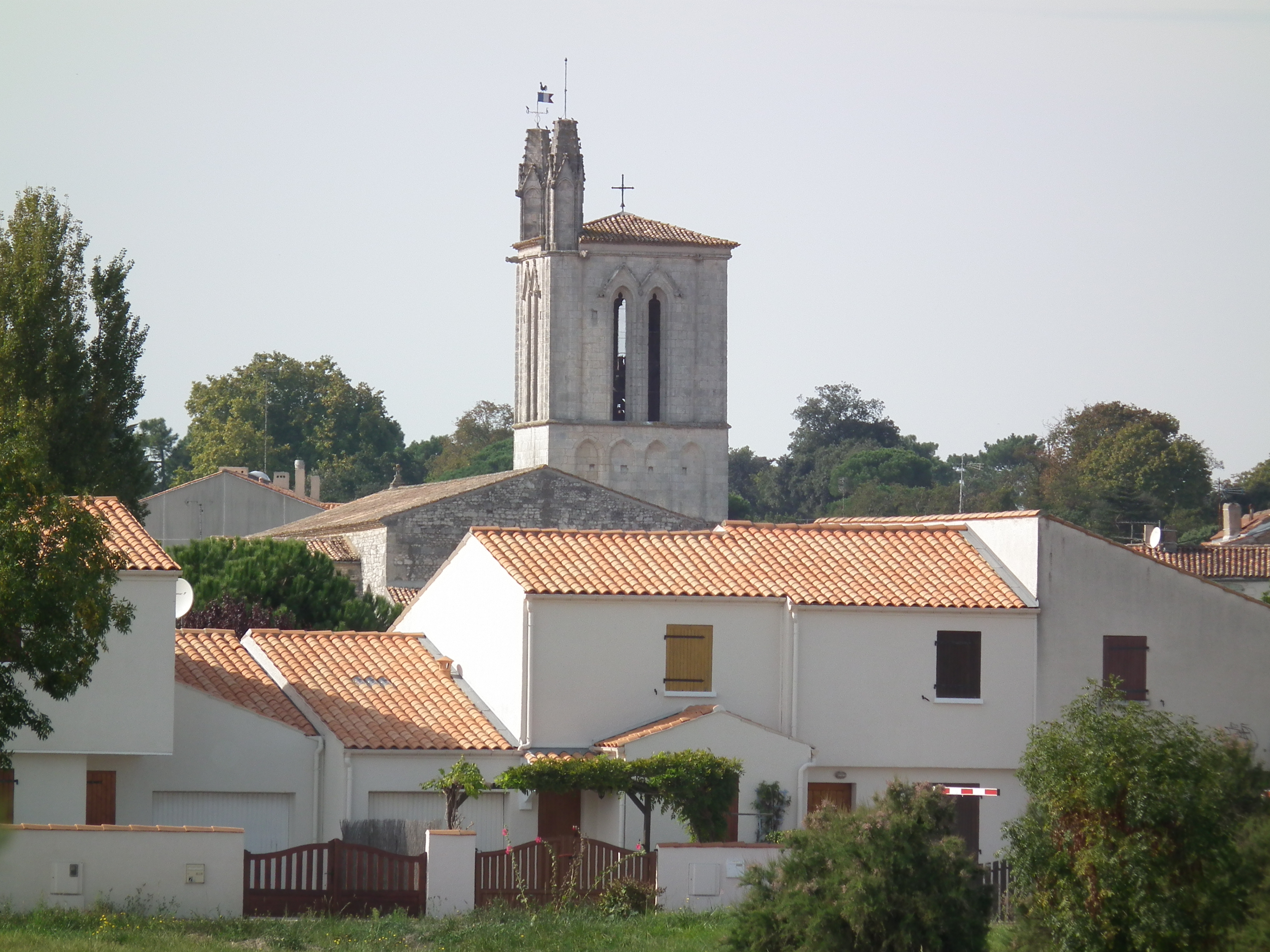 Vue de Meschers depuis le port de plaisance